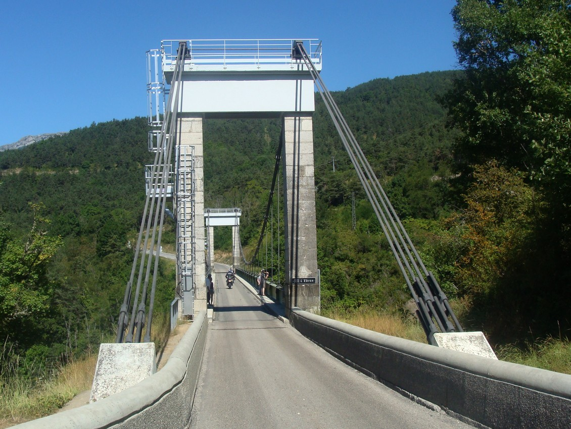 Le pont de Brion, pont suspendu sur l'Ebron, sur la route entre Monestier-de-Clermont et Mens (D 34 de l'Isère).